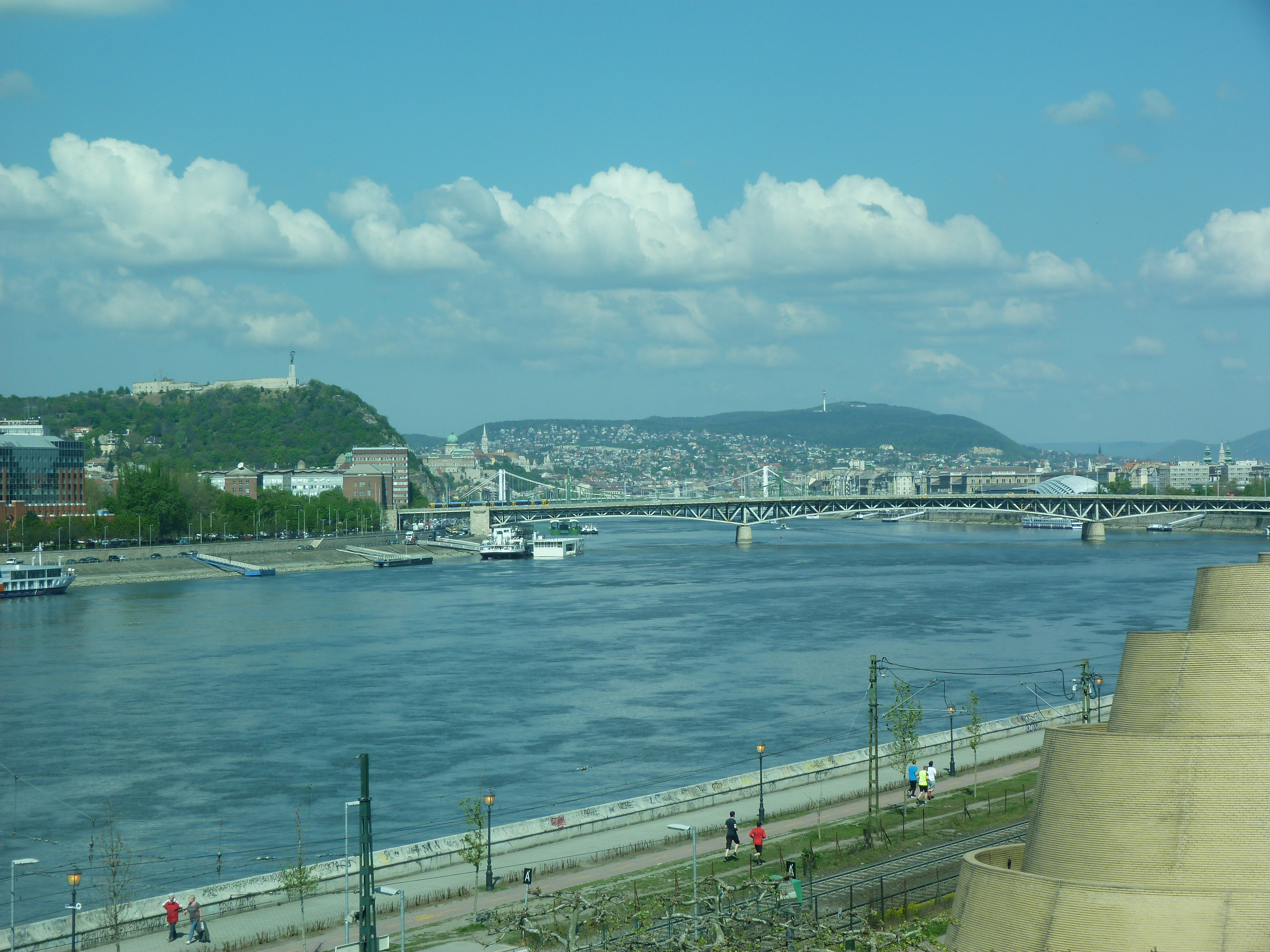 A felvétel 2014. március 11 -én kedden készült Budapesten. A Művészetek Palotája belső terei és a MÜPÁ-ból a környező épületek felé feltáruló panoráma az épület üvegfelületein keresztül.